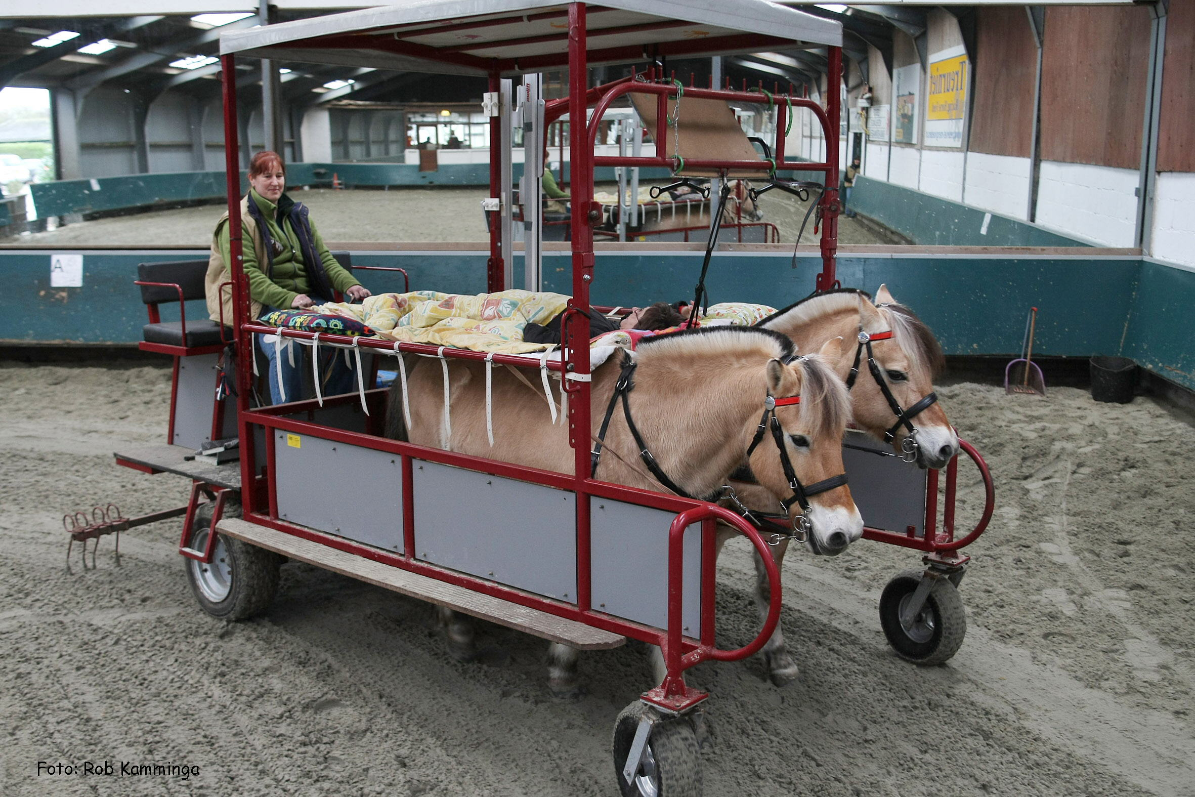 foto van een vierwielig huifbed